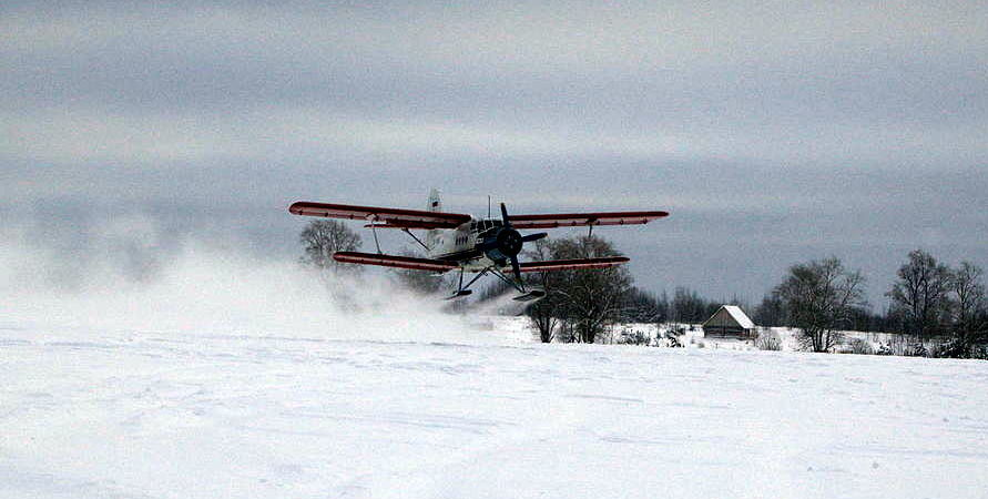 Взлет самолета Ан-2 с ПП "Кучаны" в зимнее время